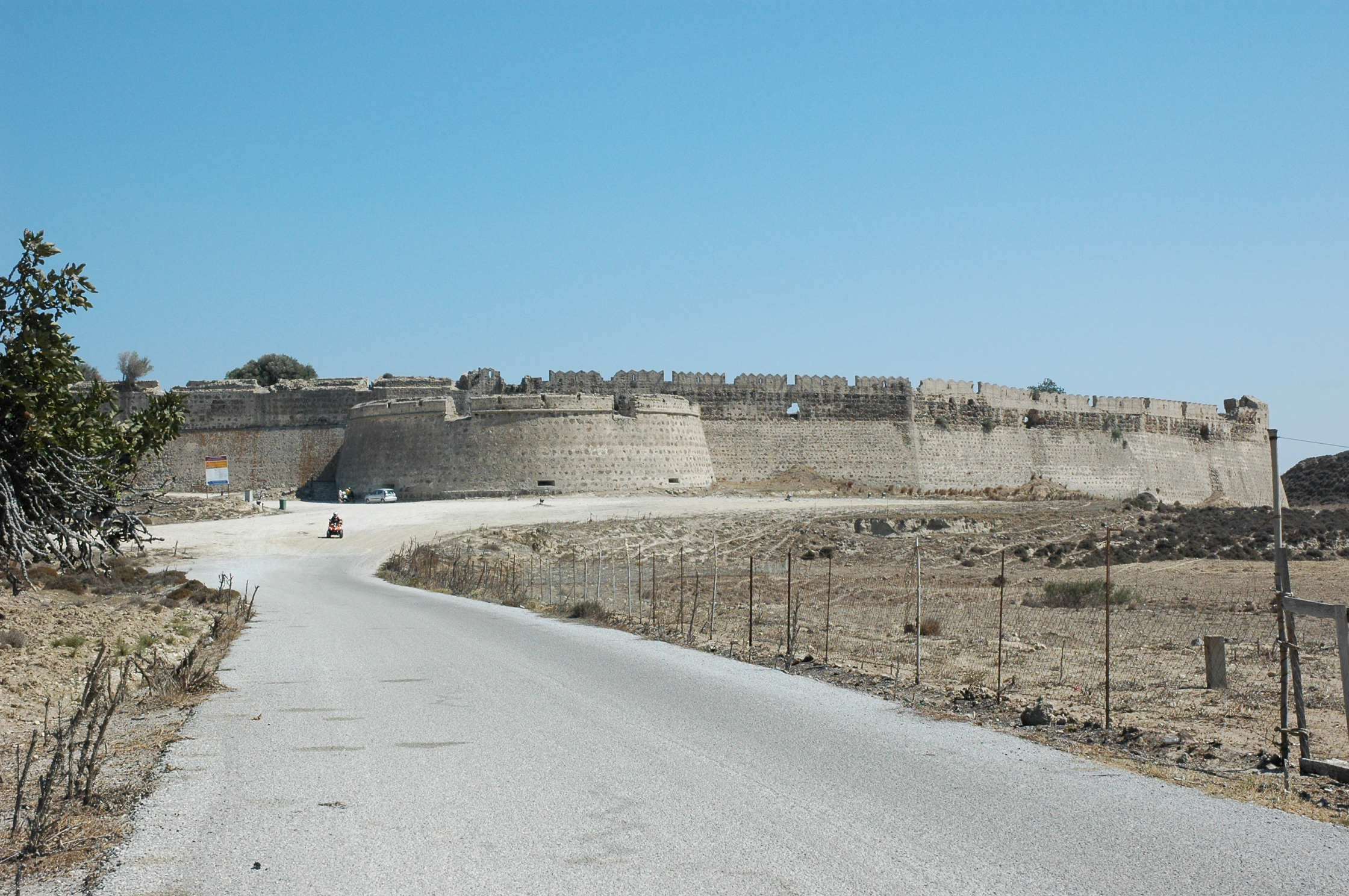 Burg von Antimachia